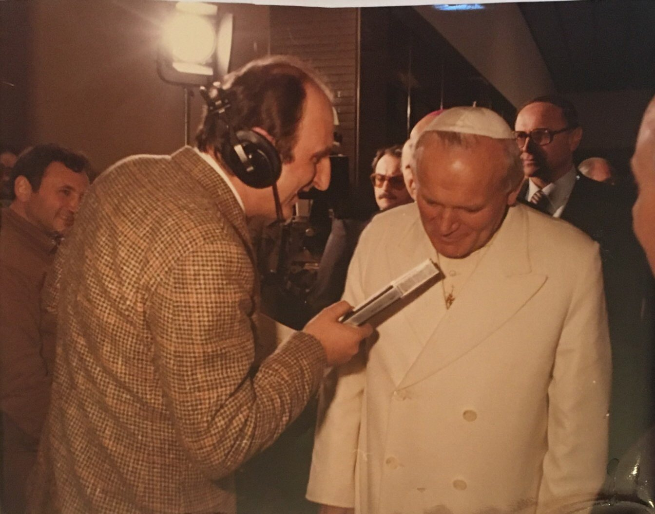 Dante Alimenti intervista Giovanni Paolo II